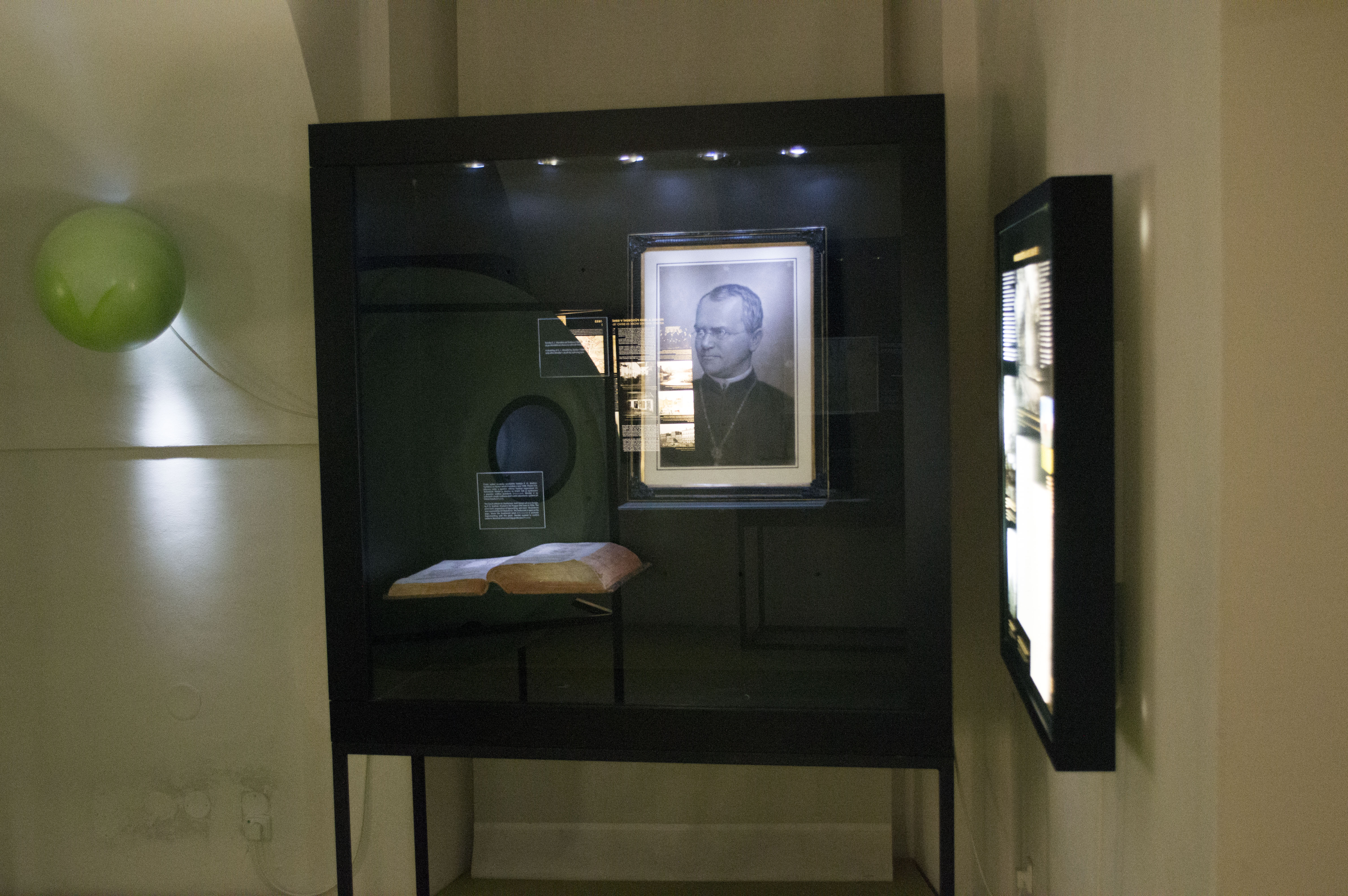 Stálá expozice v Mendelově muzeu.